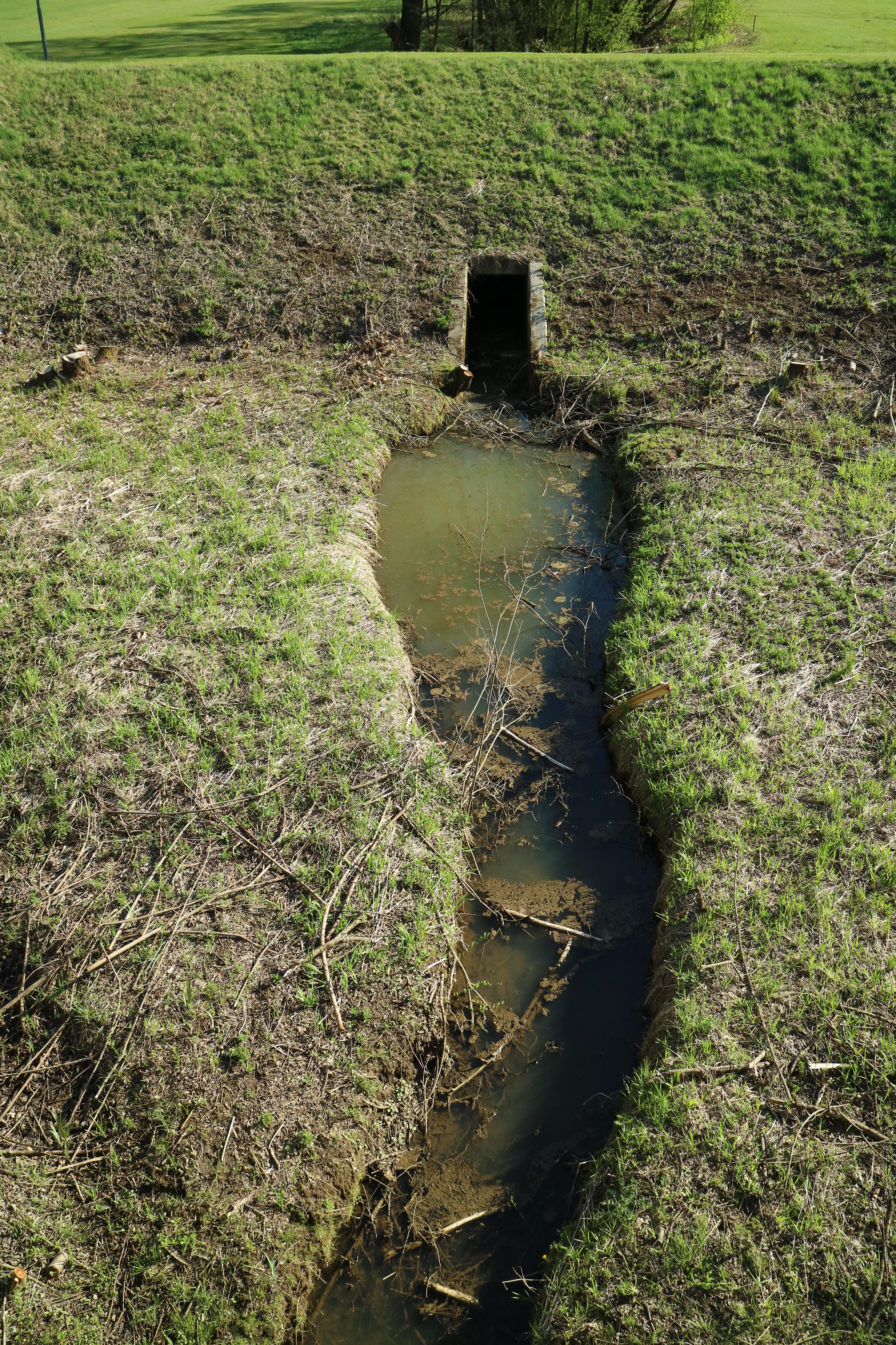 Rückhaltebecken am Katzelbach, Gemeinde Thal bei Graz, Steiermark